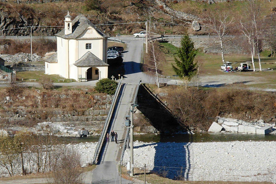 Oratorio del Gabbio, Malesco